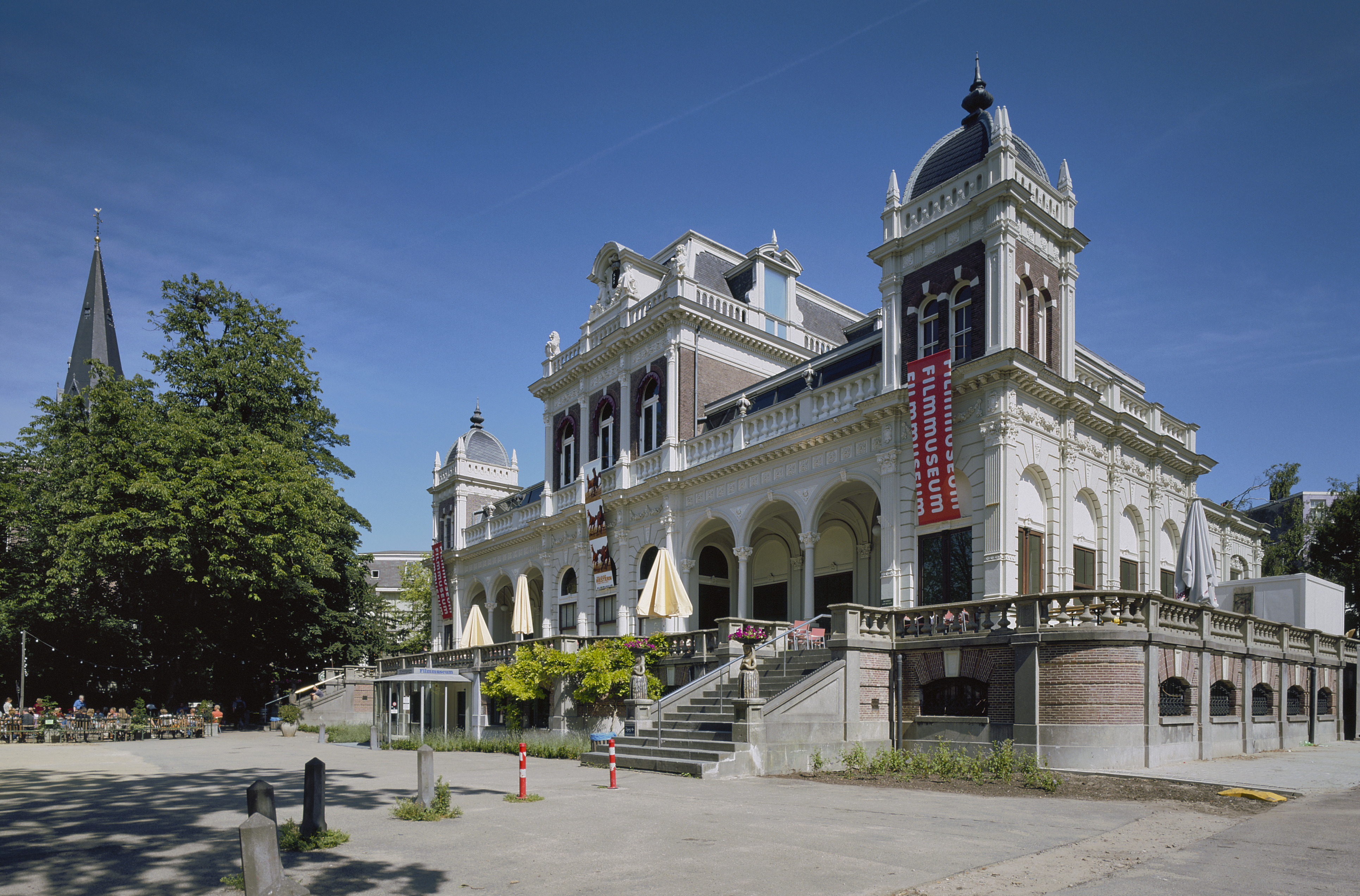 Vondelpark: Overzicht van de voorgevel en rechter zijgevel, met bordes (opmerking: Gefotografeerd voor "ANWB Monumentenboek Nederland")